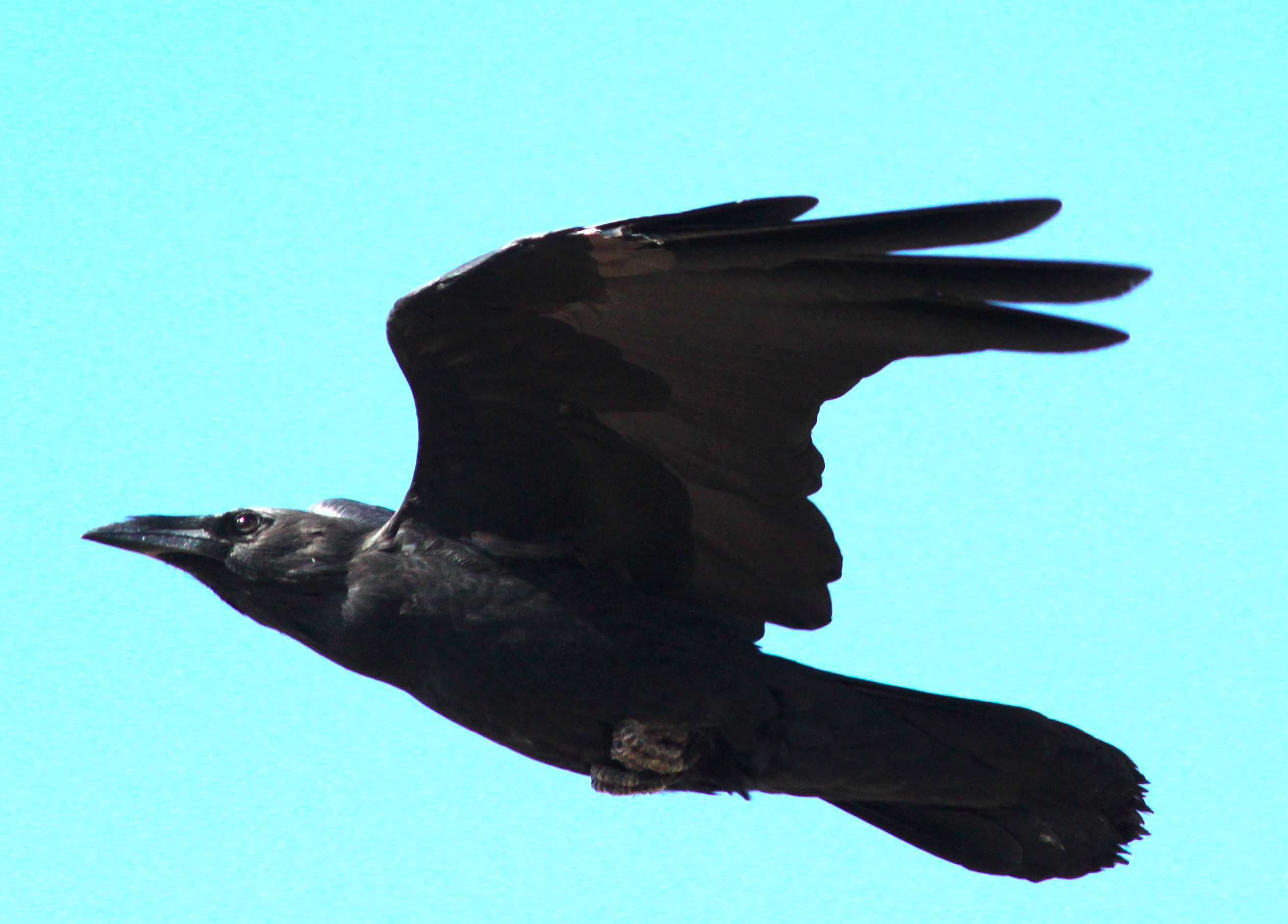 Weißhalsrabe (Corvus cryptoleucus) im Flug, Sonora Desert Museum.